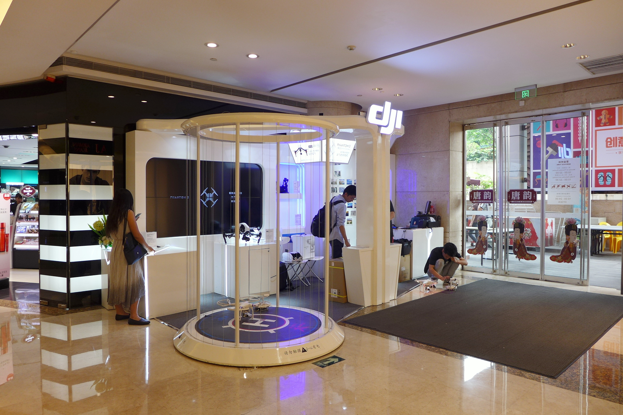 DJI Kiosk in Holiday Plaza